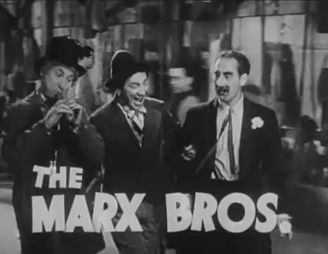 Imatges extretes del Tràiler de la pel·lícula Una nit a l'òpera dels Germans Marx.